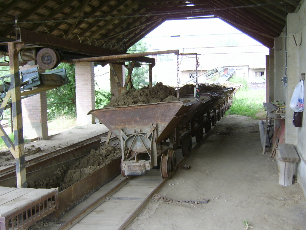 A szentesi téglagyár agyagfogadója önürítős csillékkel